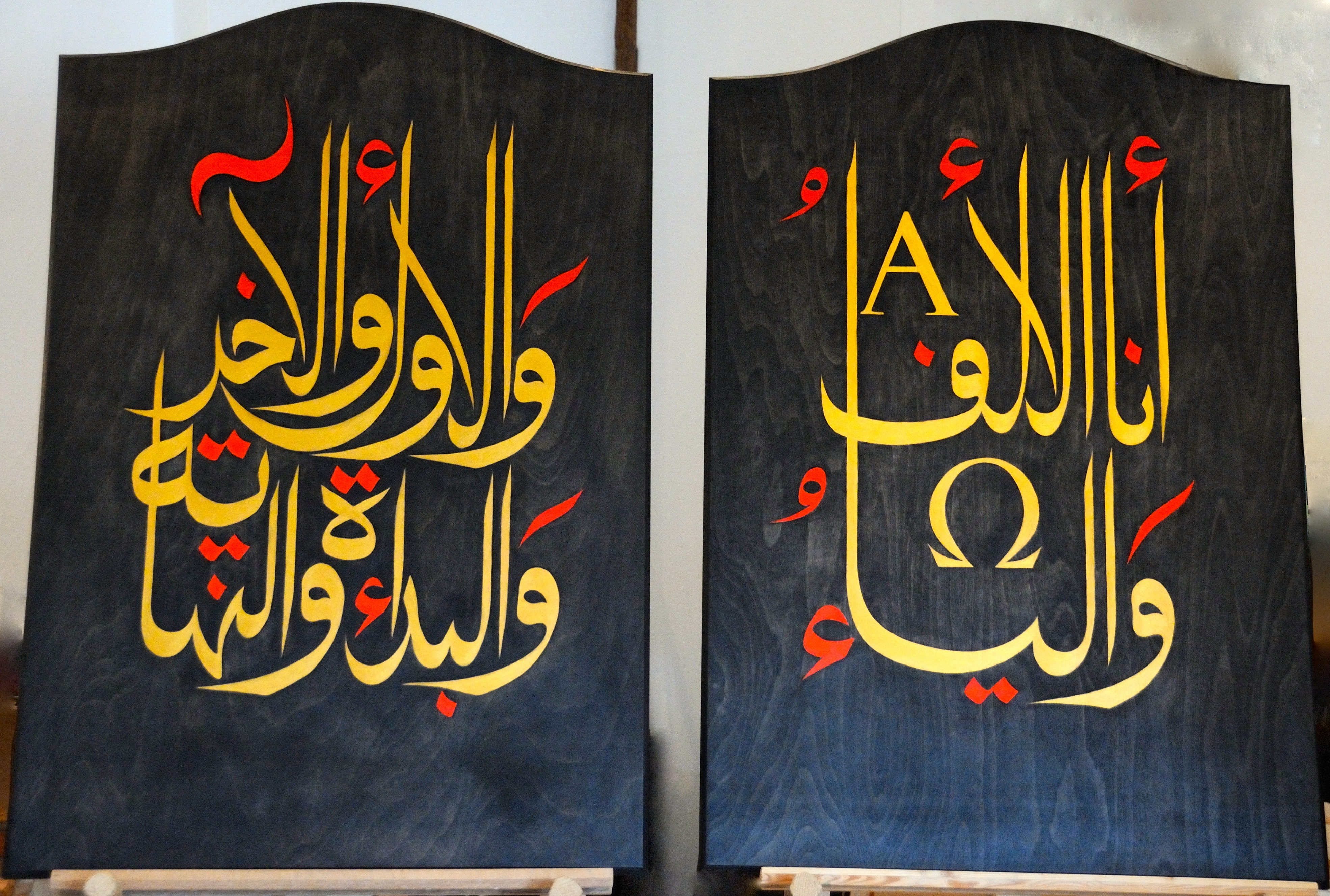 2 Holztafeln von Shahid Alam Aachen für St. Adalbert, Aachen